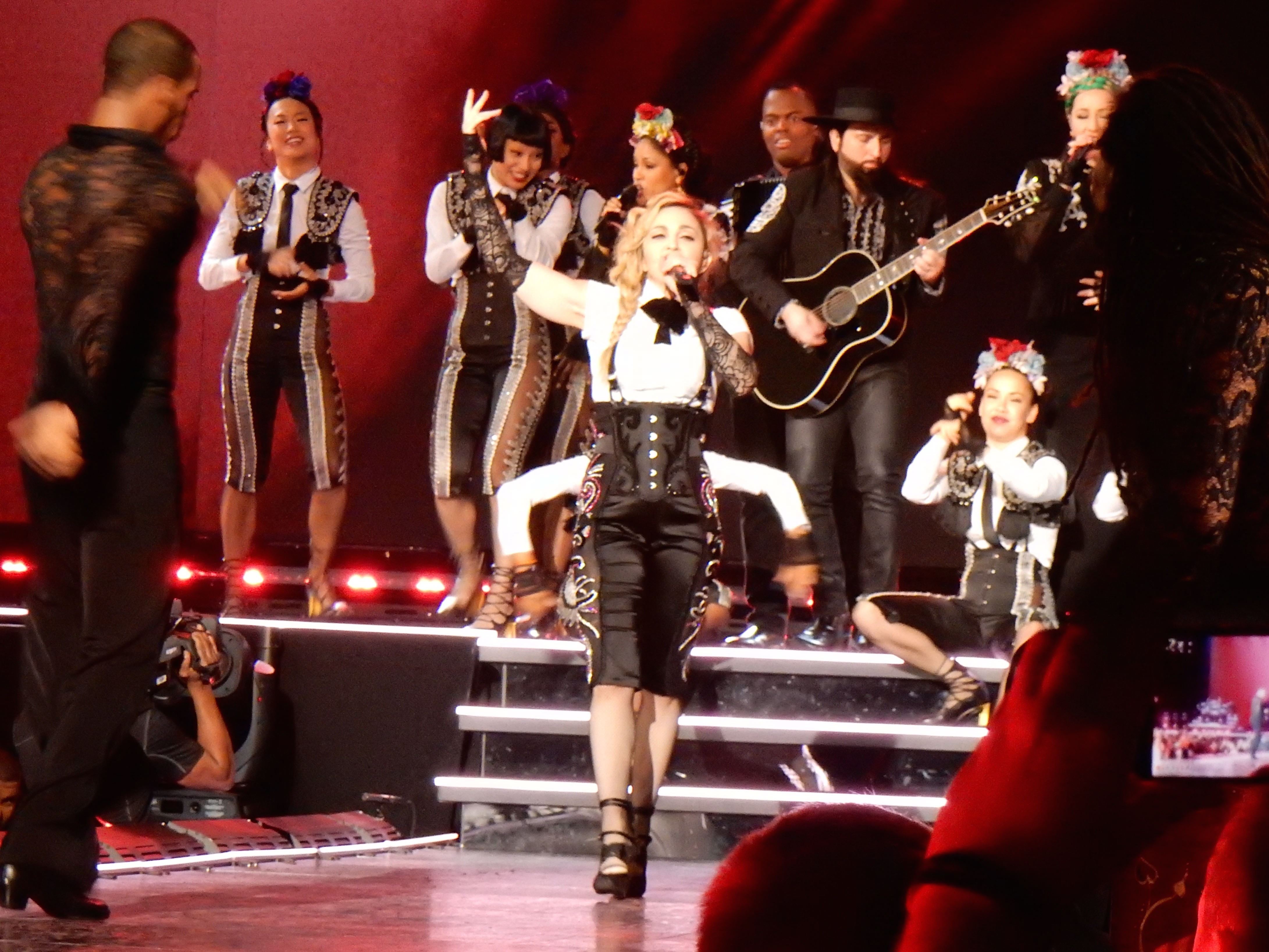 Madonna - Rebel Heart Tour Cologne 2